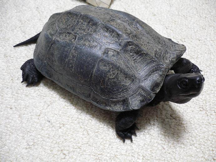 飼ってるペットを撮影したもの